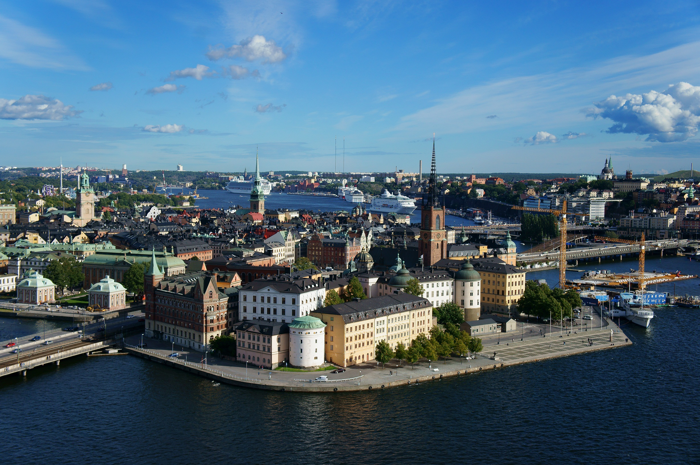 Riddarholmen (Bostadshus,Palats och stadsvilla,Befästning,Ämbetsverk )